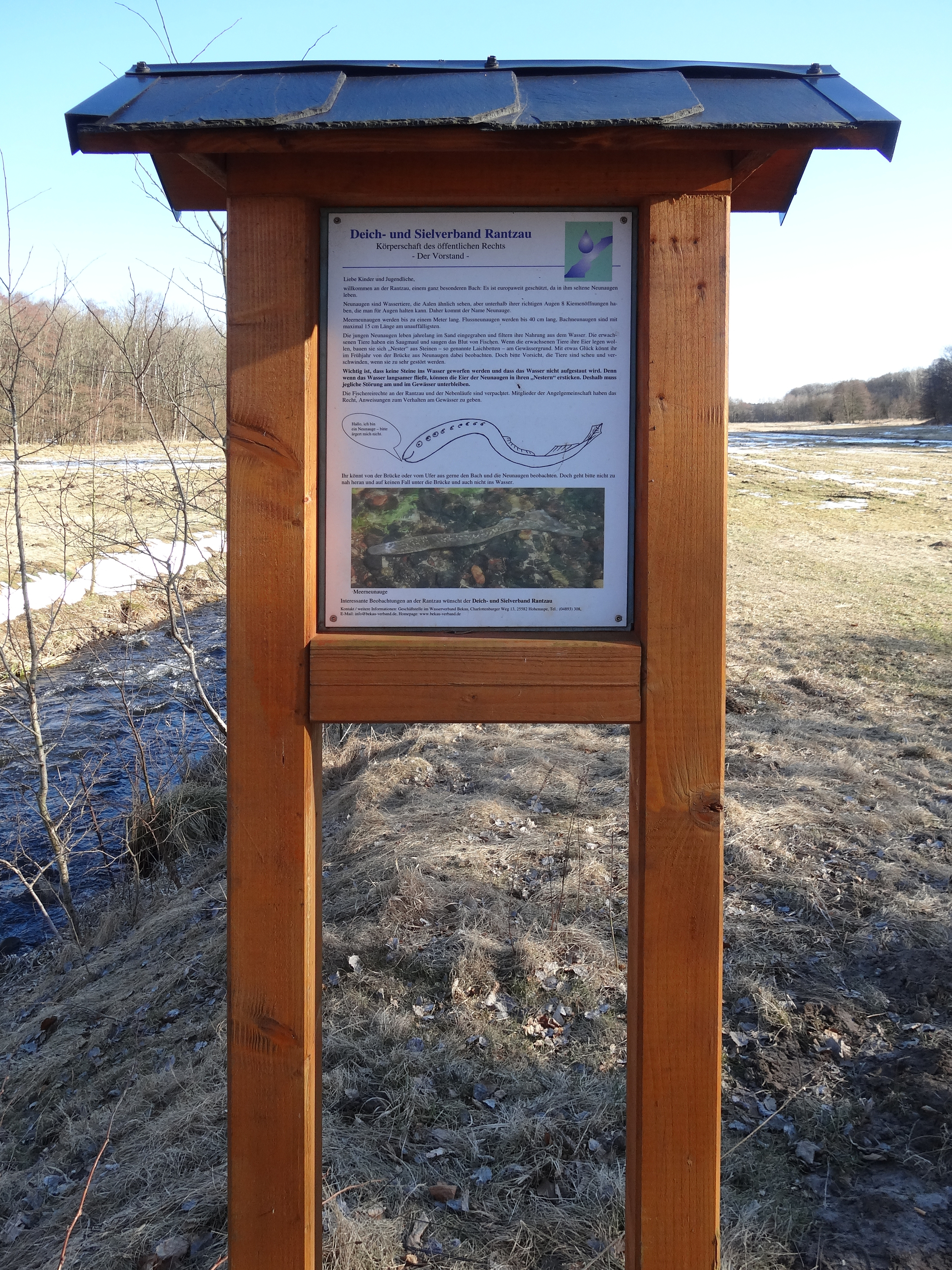 Rantzau, Hinweis auf Meerneunauge